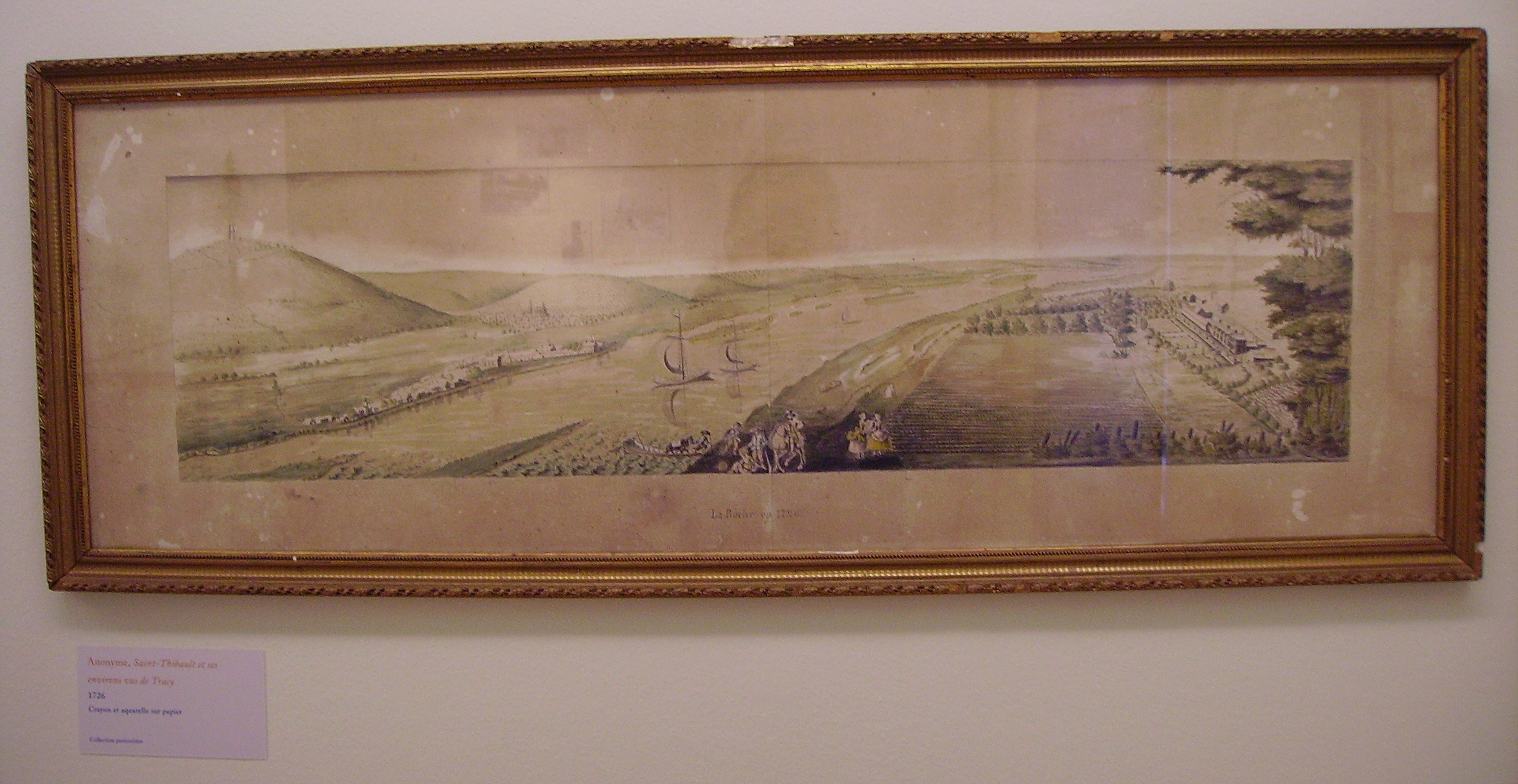 (Légende au-dessous du tableau :) Anonyme, Saint-Thibault et ses environs vus de Tracy, 1726, crayon et aquarelle sur papier, collection particulière